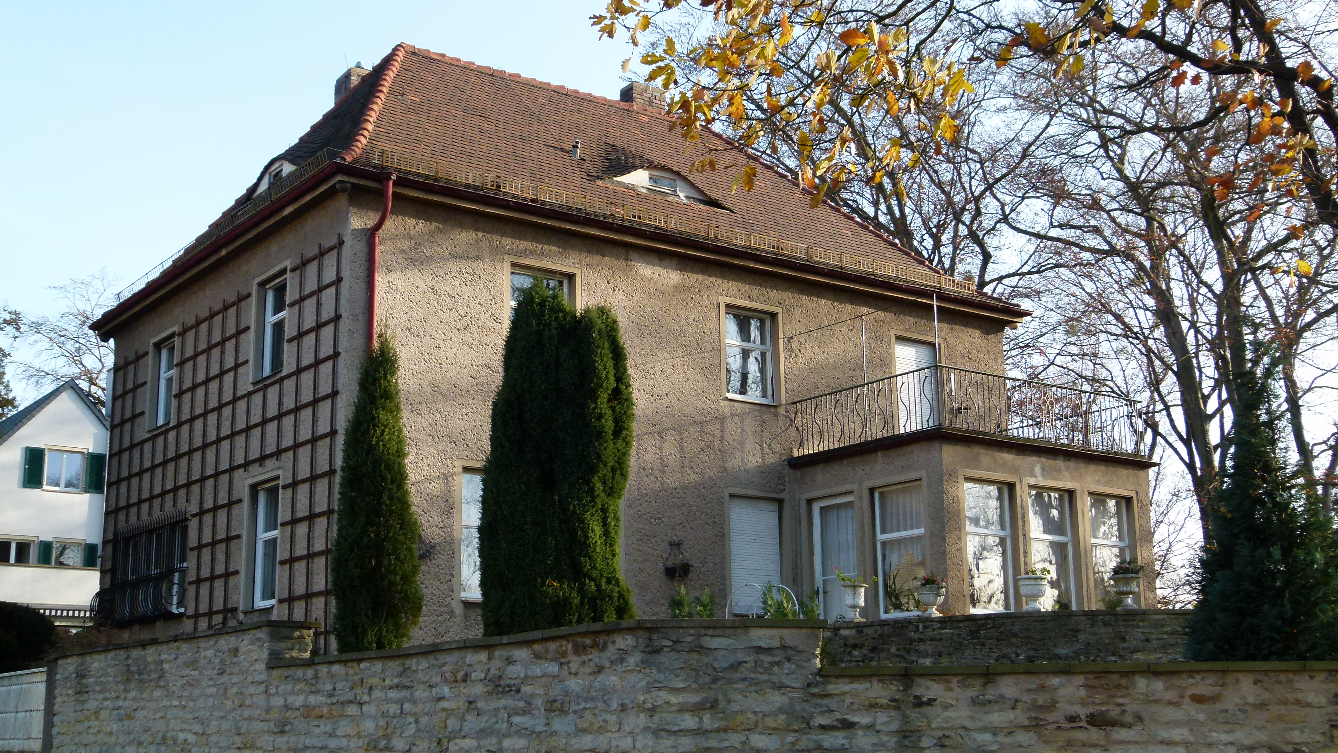 Denkmalgeschützte Villa Krieger, Collenbuschstraße 10, Loschwitz, Dresden